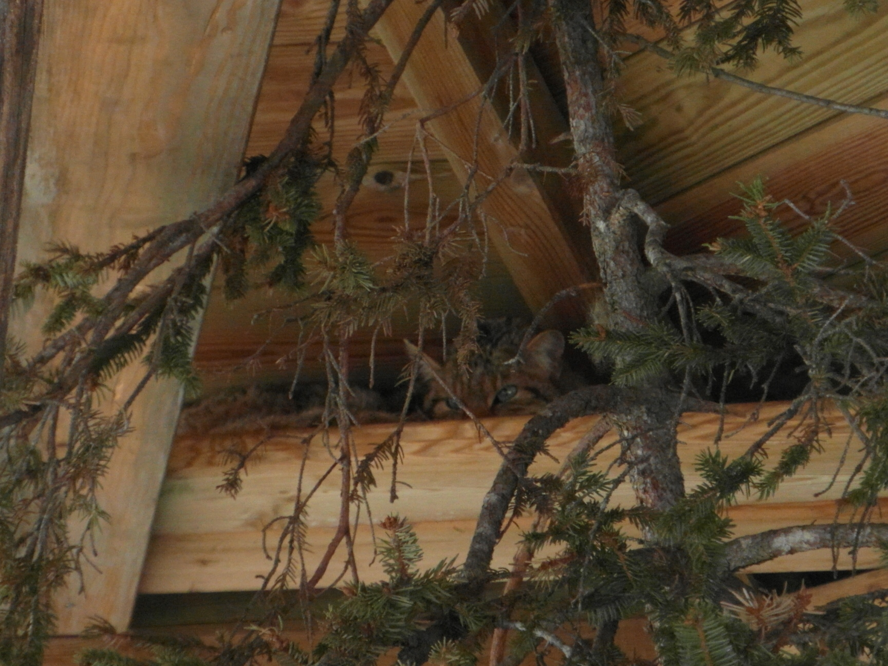 Gatto selvatico presso il parco faunistico di Spormaggiore